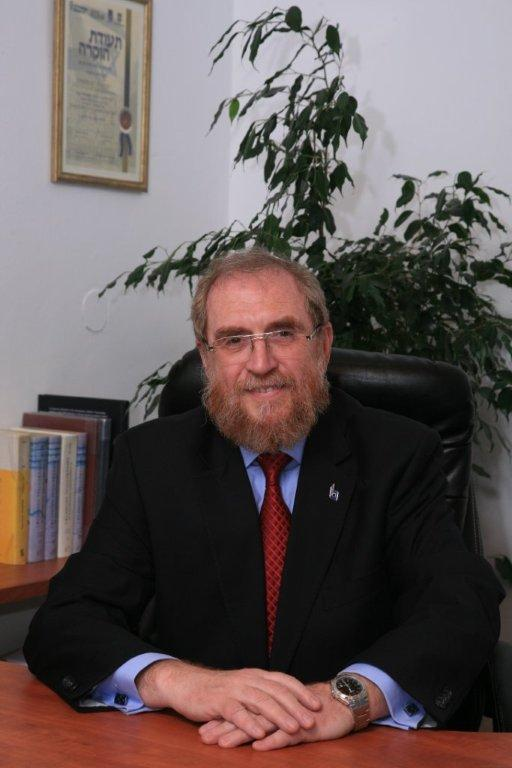 Pangasinan: President Machon Lev